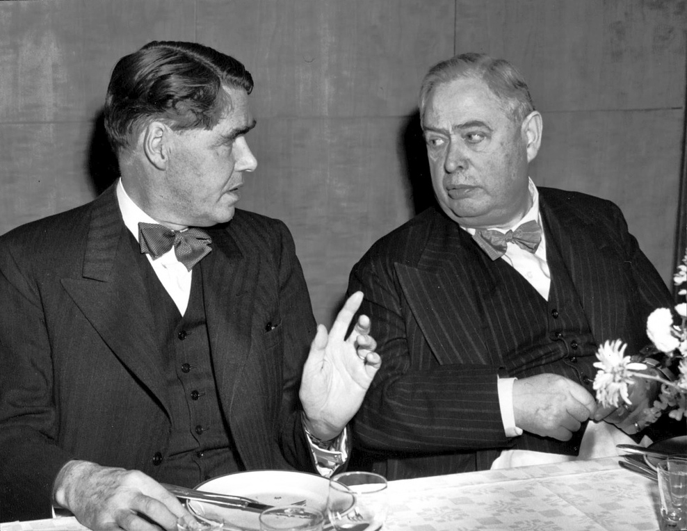 Nye ordföranden, professor Håkan Nial, tillsammans med sin företrädare professor Sven Tunberg.Skaradjäknarnas förening hade på onsdagen höstmöte på Gillet. Till ny ordförande efter professor Sven Tunberg, som avsagt sig sedan han i 16 år varit föreningens ordförande, valdes professor Håkan Nial, och till vice ordförande redaktör Allan Hernelius. Till ny ledamot av styrelsen invaldes K. J. Grenabo.